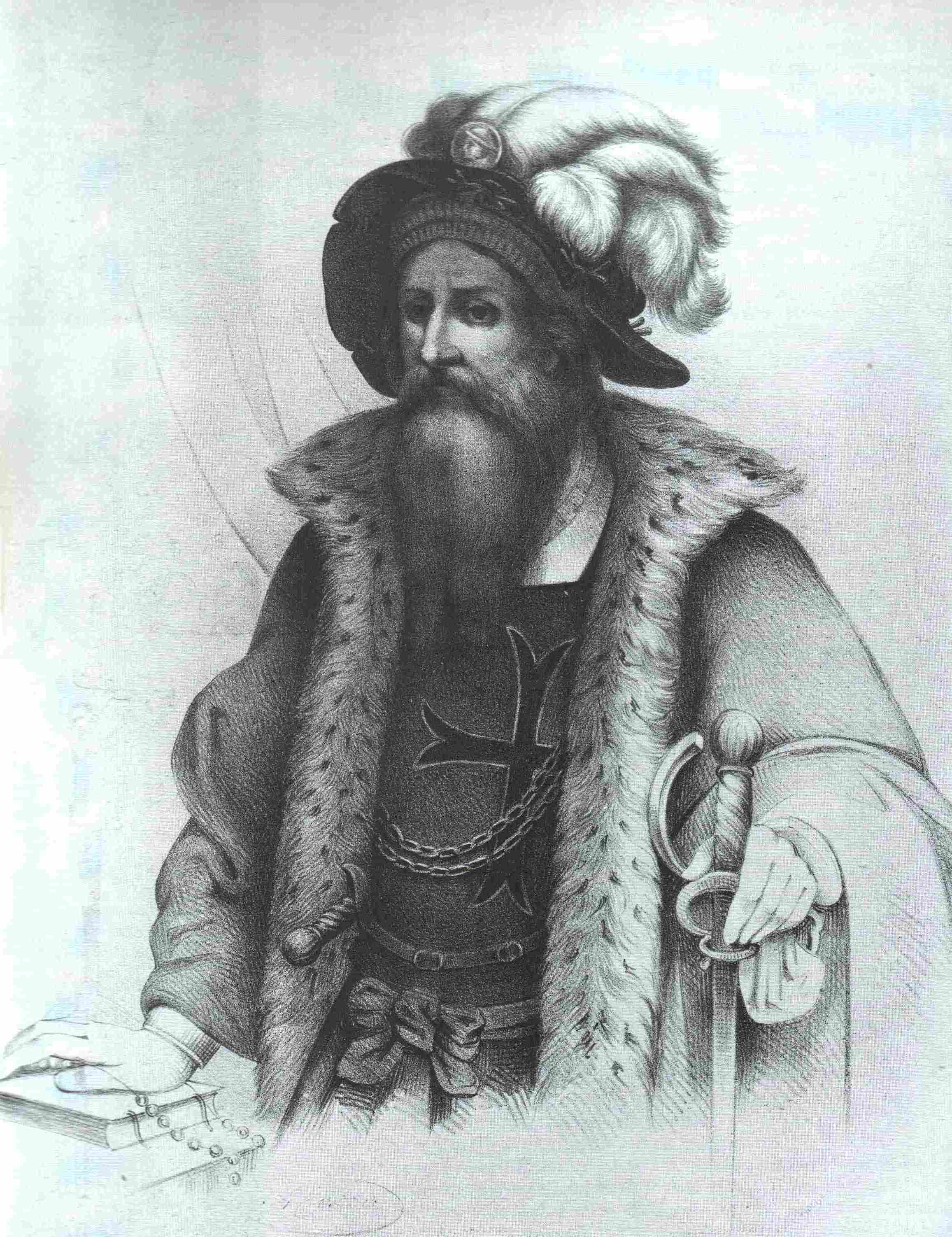 Ritratto di Rodolfo Tanzi, fondatore di un ospedale a Parma nel 1201.